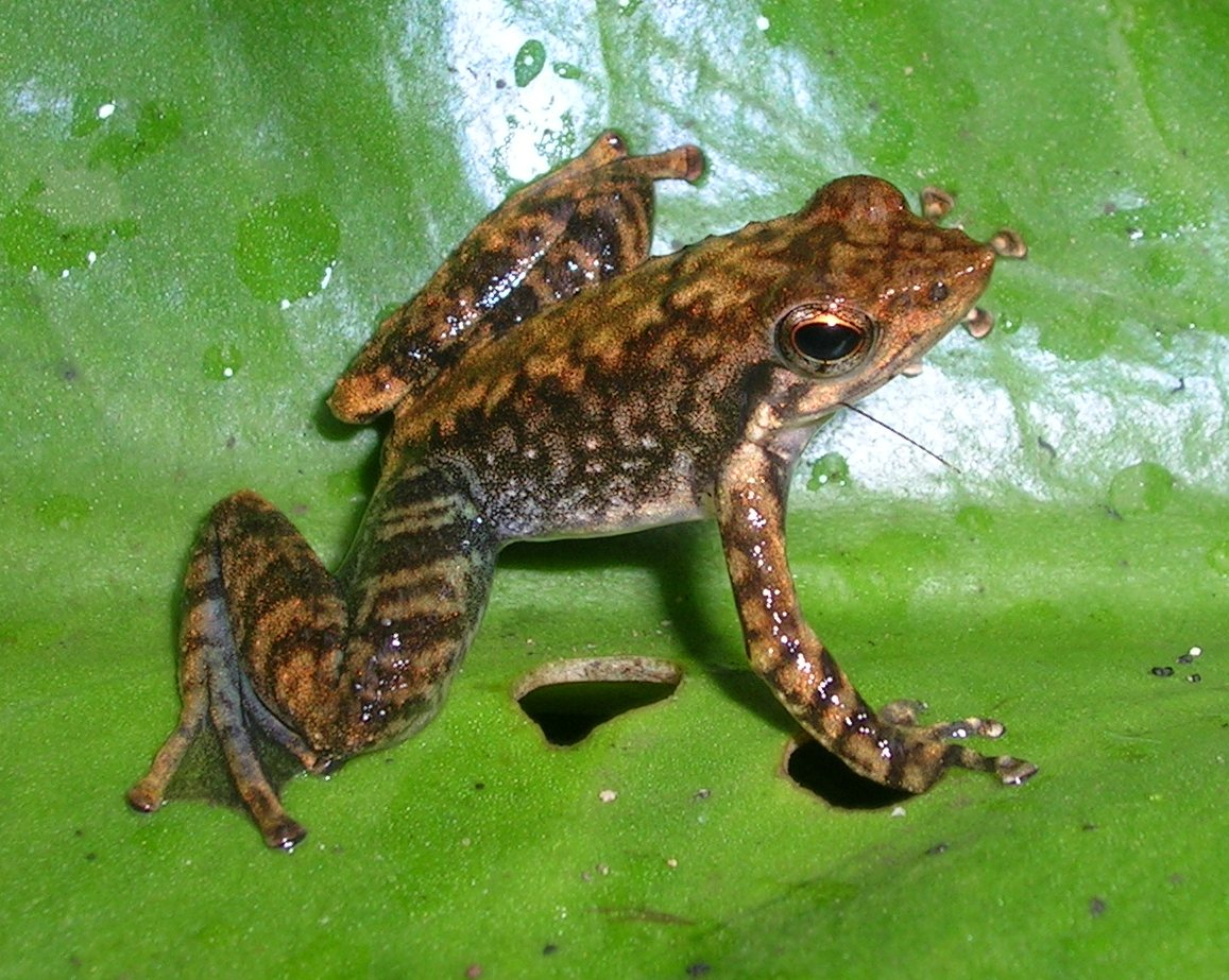 Micrixalus saxicola from Wayanad, Kerala, Oct 2007